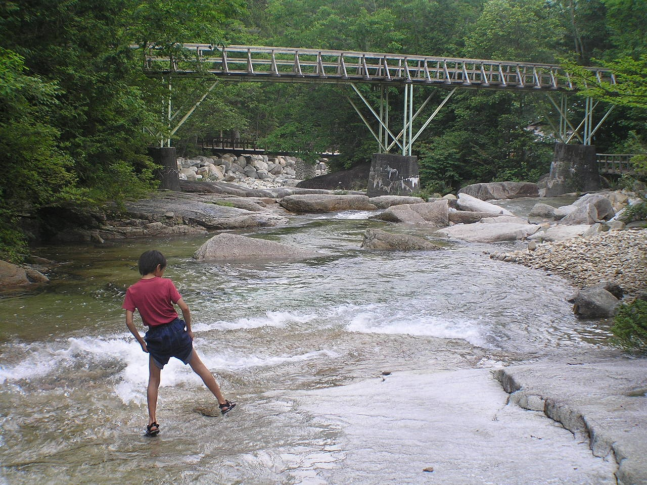 赤沢自然休養林 渓流コース